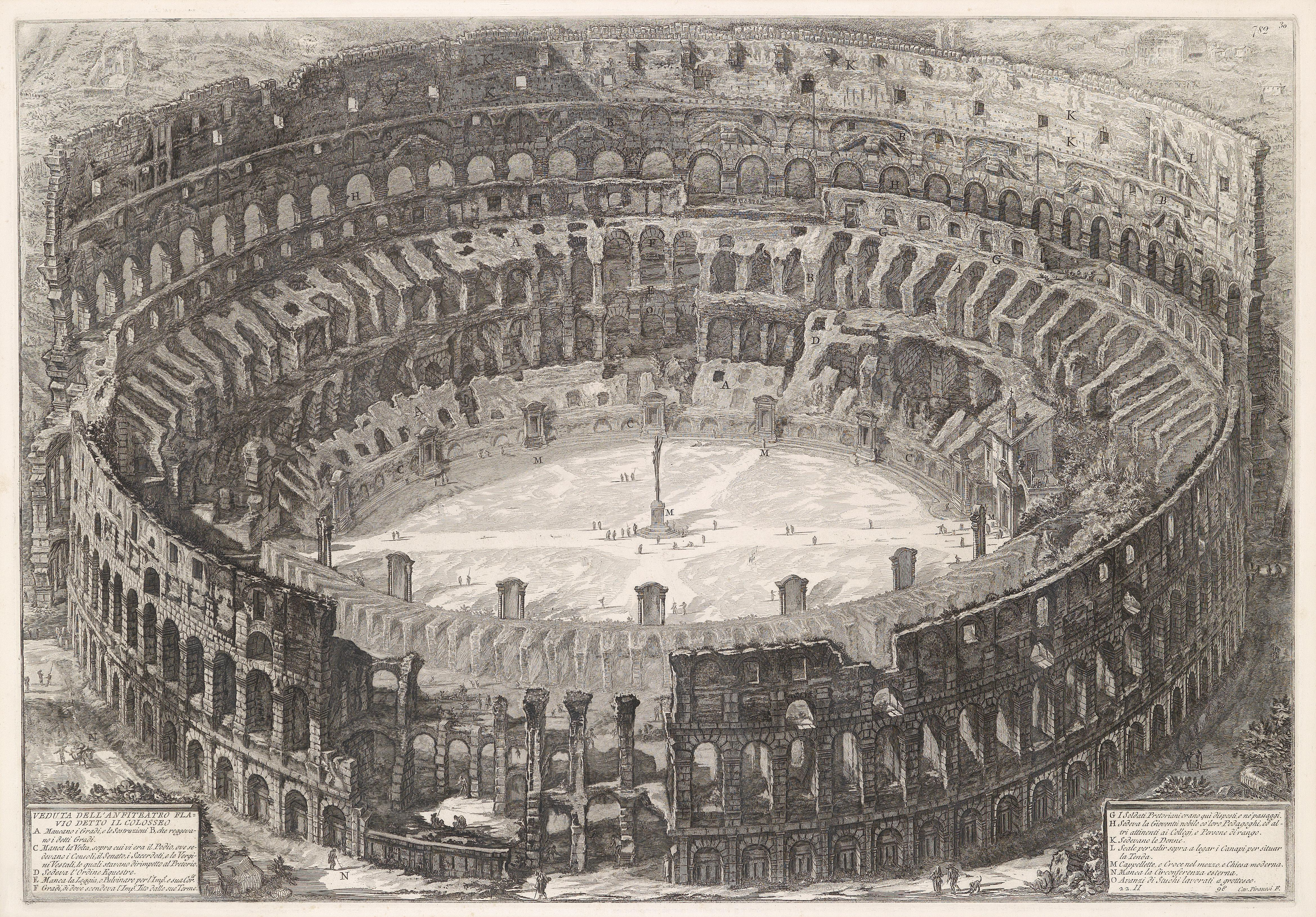 Ansicht vom Kolosseum aus der Vogelperspektive, Radierung, in der Platte signiert Cav. Piranesi F., 49,5 x 70,8 cm, Ausgabe Firmin-Didot, Paris um 1860